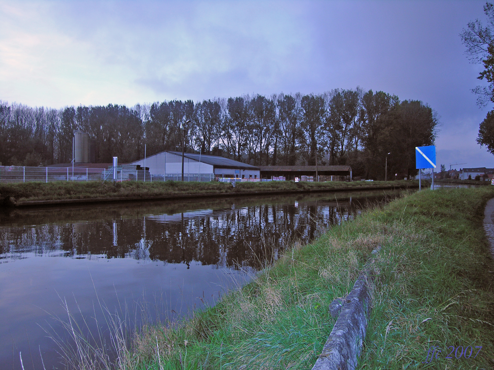 Kanaal Gent-Brugge in Steenbrugge